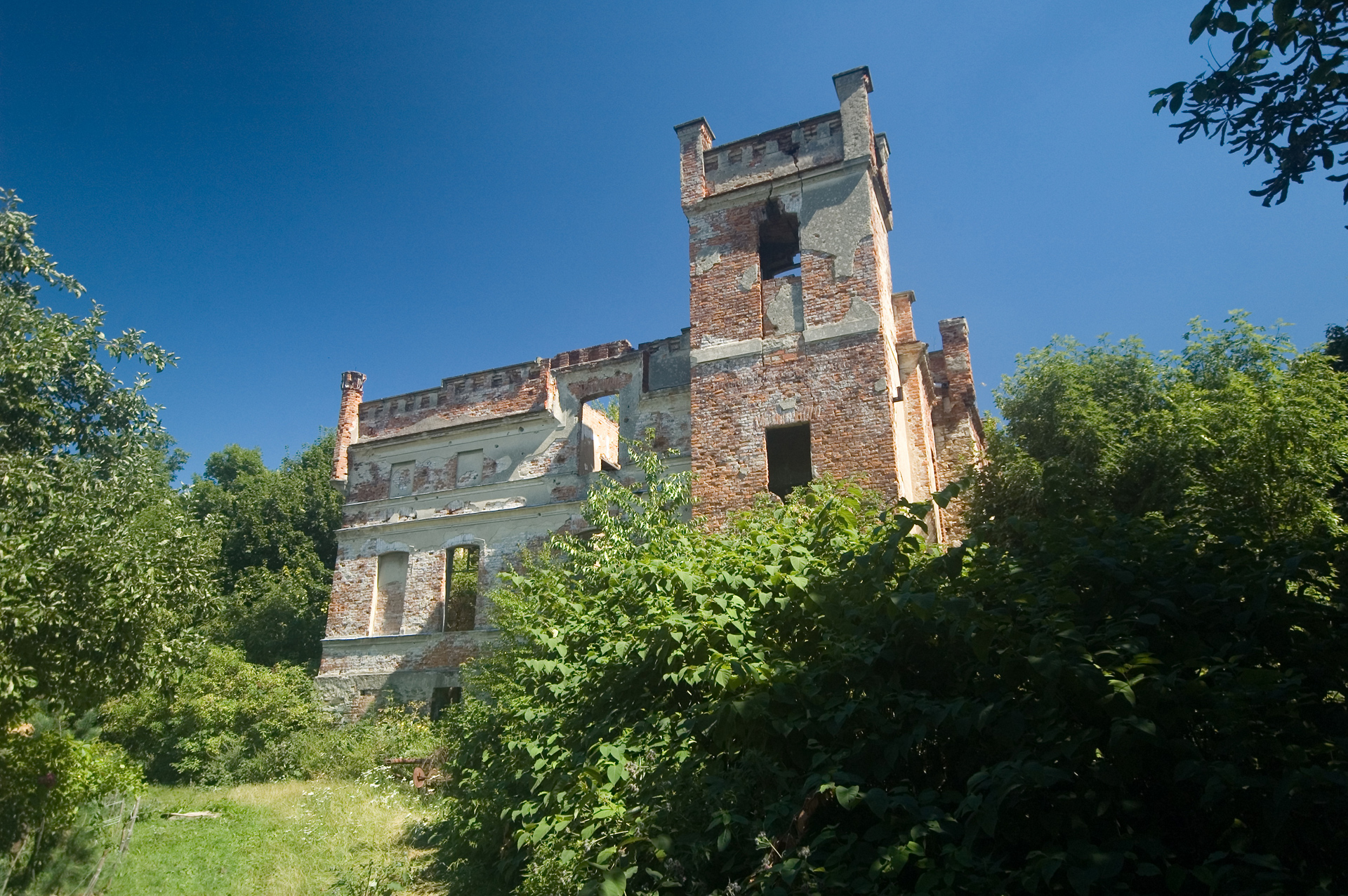 Mietków, ul. Parkowa 3 - dwór obronny, ruina (zabytek nr A/3898/1798 z dn. 1966-08-22)